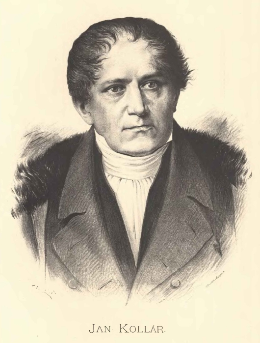 Portréty předních osobností od Jana Vilímka